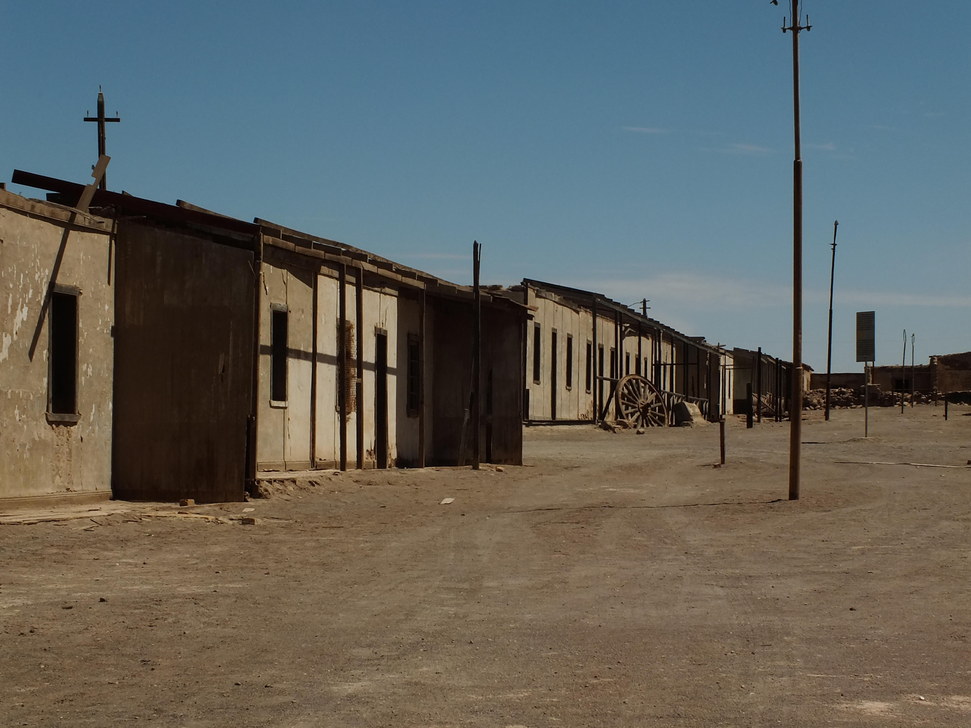 Oficina Salitrera Chacabuco tantos recuerdos que se quedaron perdidos en las cálidas arenas del desierto... This is a photo of a national monument in Chile: 538